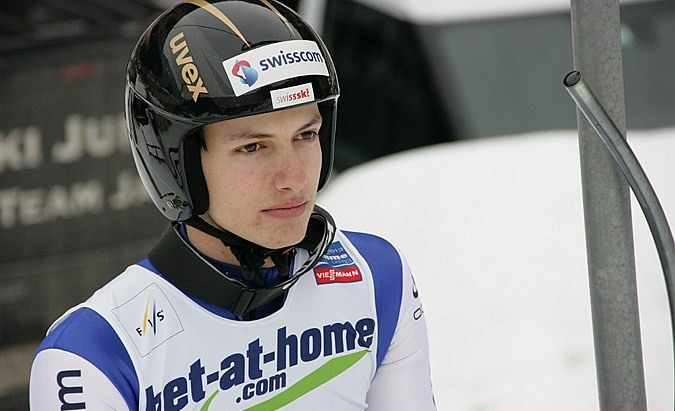 Gregor Deschwanden podczas konkursu indywidualnego mężczyzn na skoczni normalnej w ramach Mistrzostw Świata 2013.